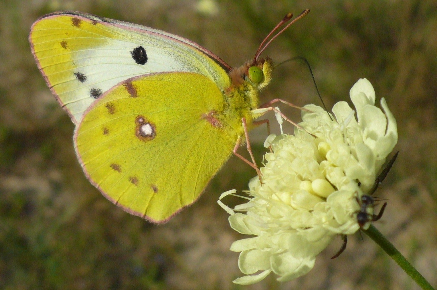 Szlaczkoń siarecznik na poligonie WAT